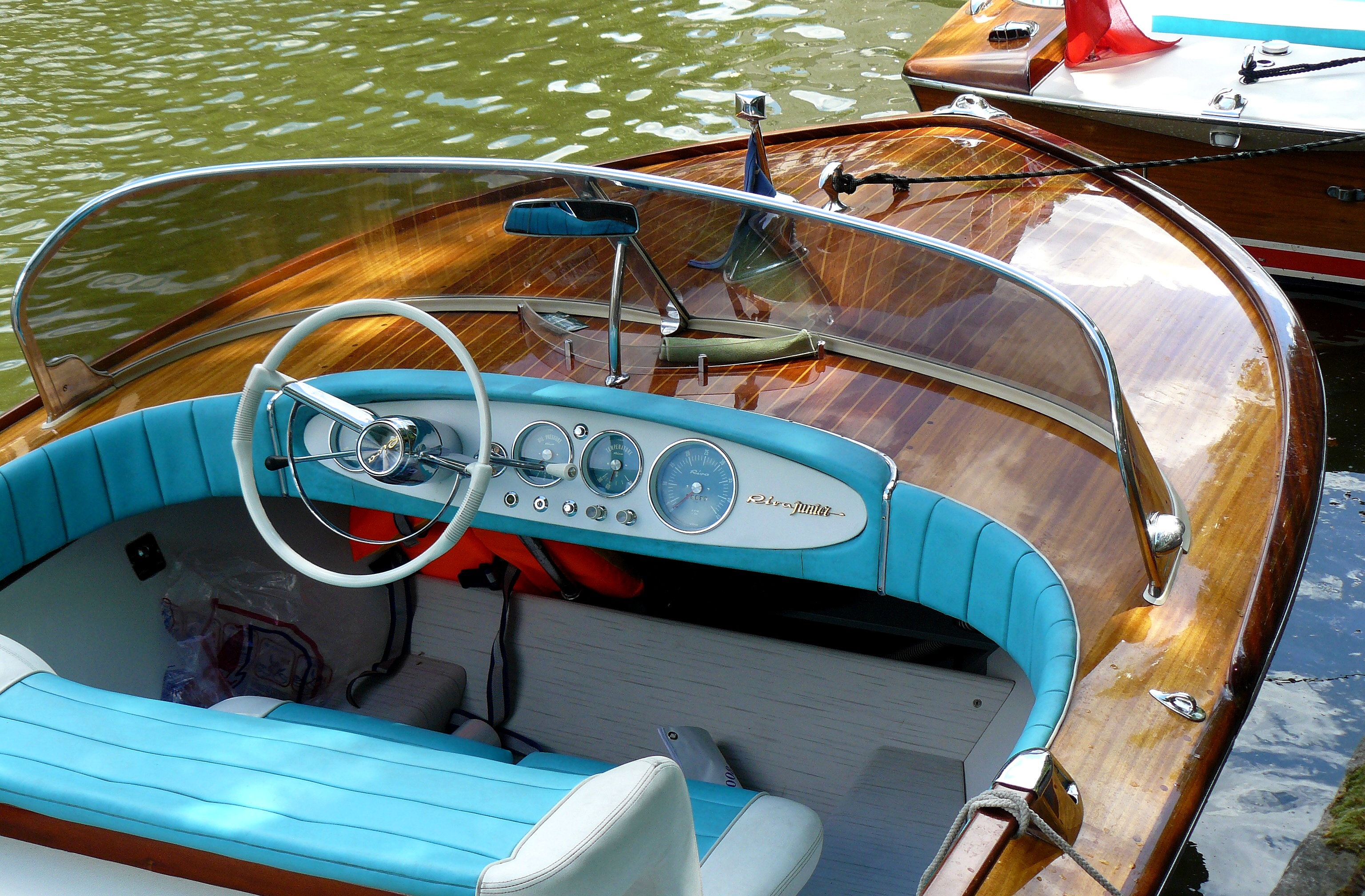 Habitacle d'un "Riva junior" ammaré canal Saint-Martin à Paris